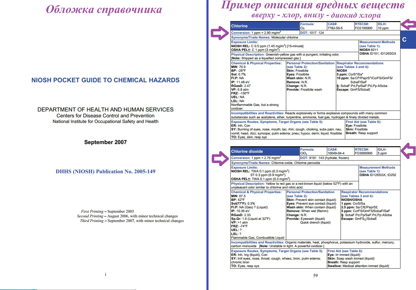 Выдержка из справочника по вредным химическим веществам с примером значений мгновенно-опасной концентрации хлора и диоксида хлора